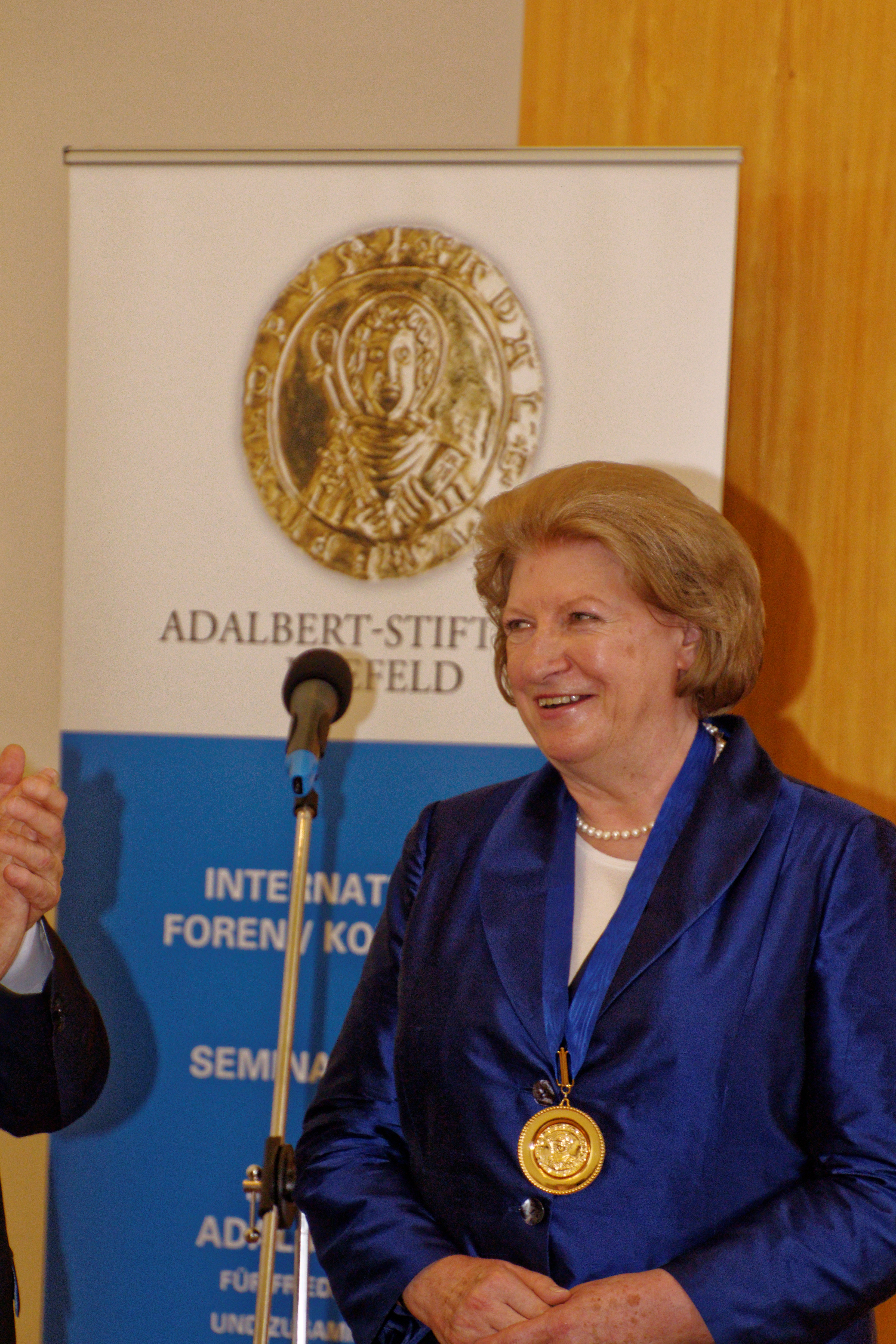 Hanna Suchocka, ehem. Ministerpräsidentin Polen, anläßlich der Adalbert-Preis Verleihung in Bratislava